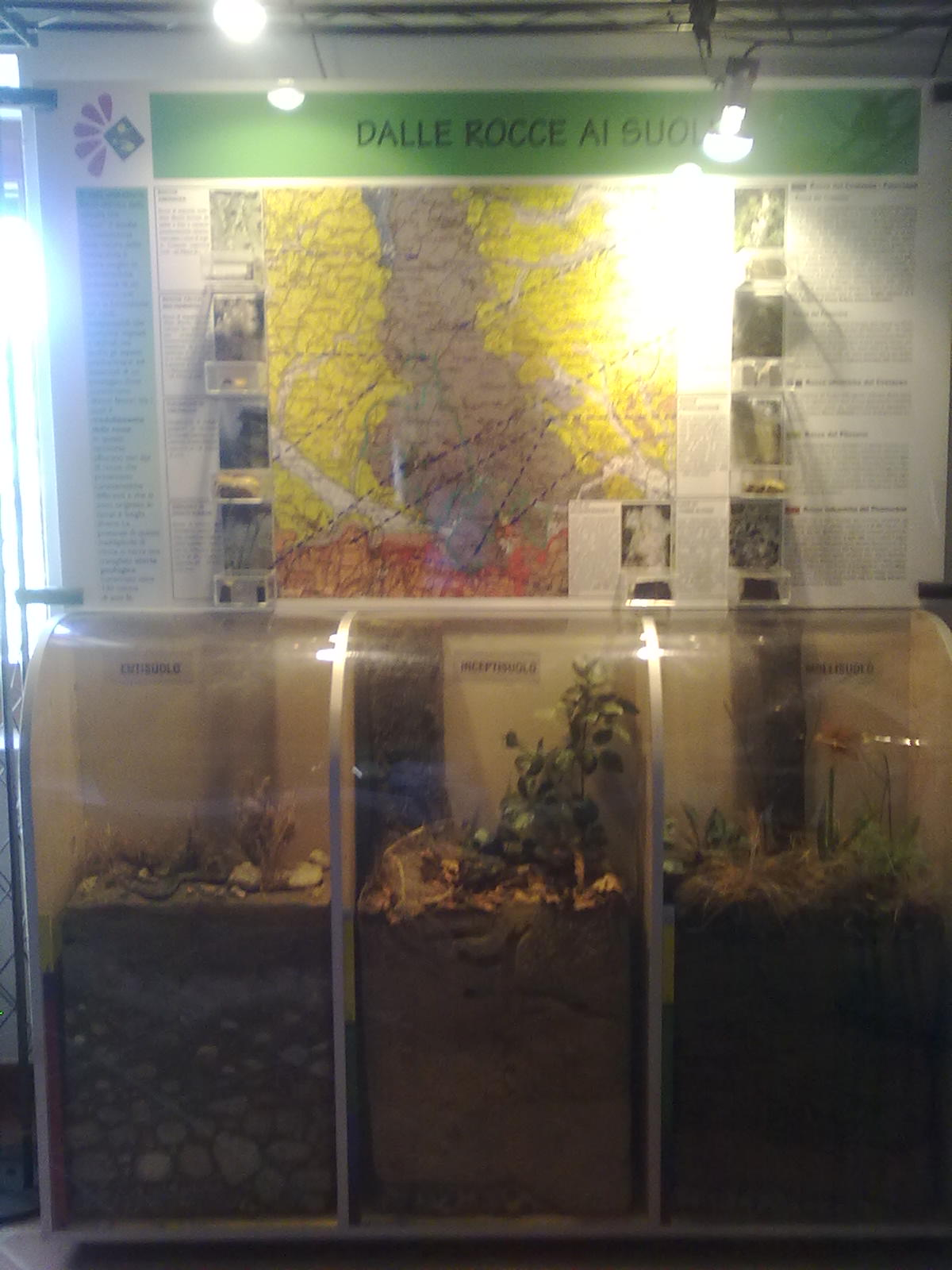 Strumenti all'interno del museo